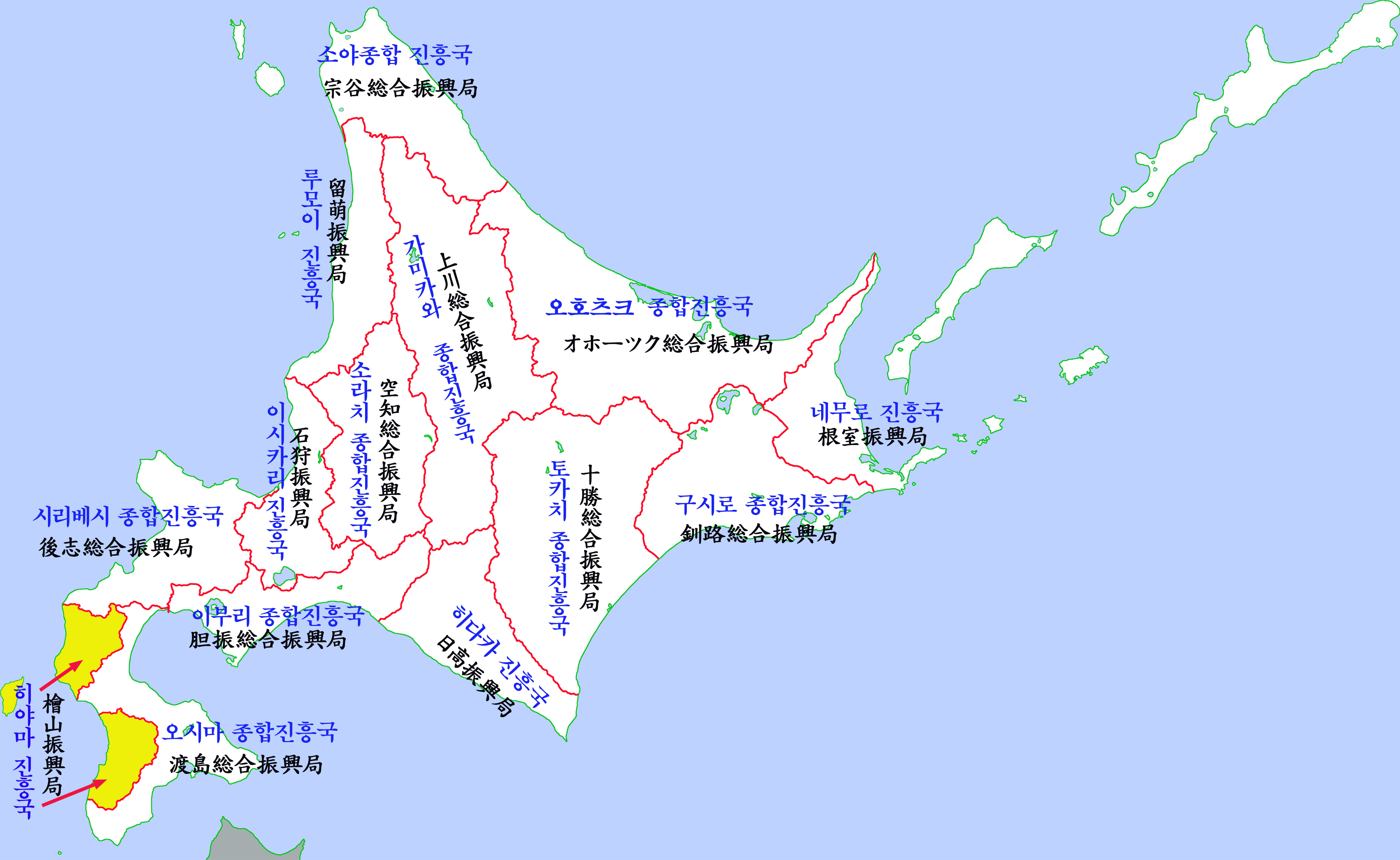 홋가이도 지청구역